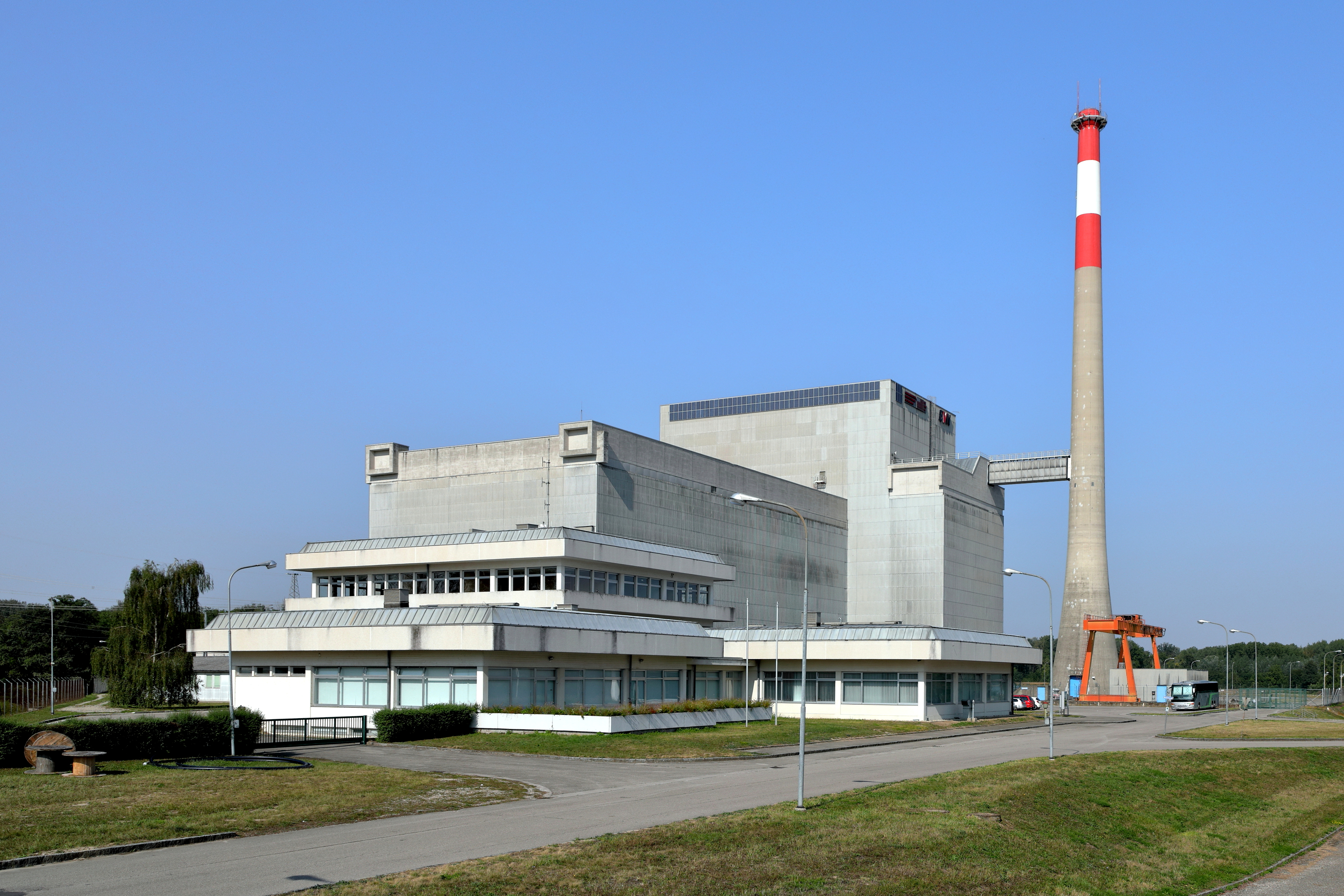 Ostansicht des nie in Betrieb genommenen Kernkraftwerks in der niederösterreichische Marktgemeinde Zwentendorf an der Donau.Der Spatenstich für das Atomkraftwerk mit dem rd. 110 m hohen Schornstein erfolgte am 4. April 1972 und war das erste von mehreren geplanten. Nach vier Jahren fand die Fertigstellung des Siedewasserreaktors mit einer Leistung von rd. 750 Megawatt (elektr. Energie für rd. 1,8 Mio. Haushalte) statt. Bei einer Volksabstimmung am 5. Nov. 1978 - die 1. Volksabstimmung in der 2. Republik - entschied das Wahlvolk mit 50,47%, dass der Atommeiler nicht in Betrieb genommen werden darf. Bis zur „stillen Liquidierung“ im März 1985 waren Kosten von etwa 14 Milliarden Schilling (1 Mrd. Euro) angefallen.